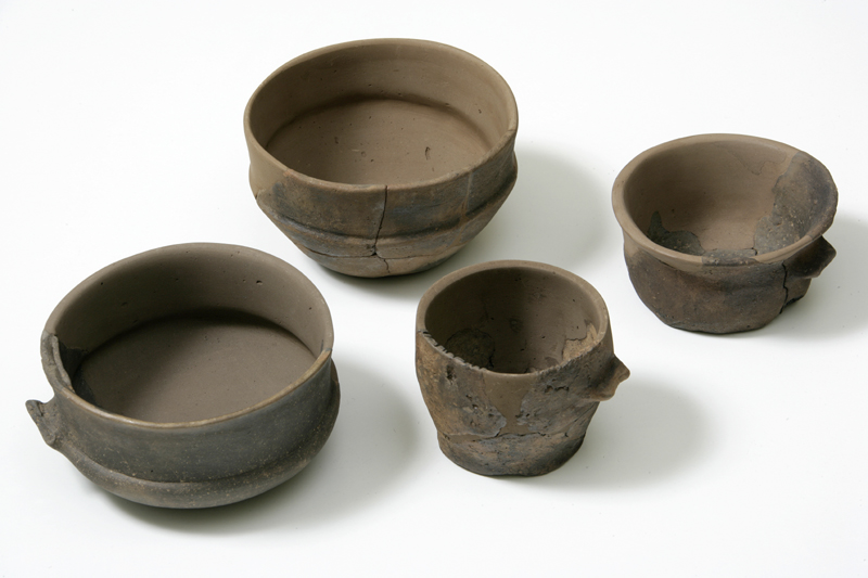 Tazze e scodelle in ceramica di impasto medio-fine, per bere o mangiare.